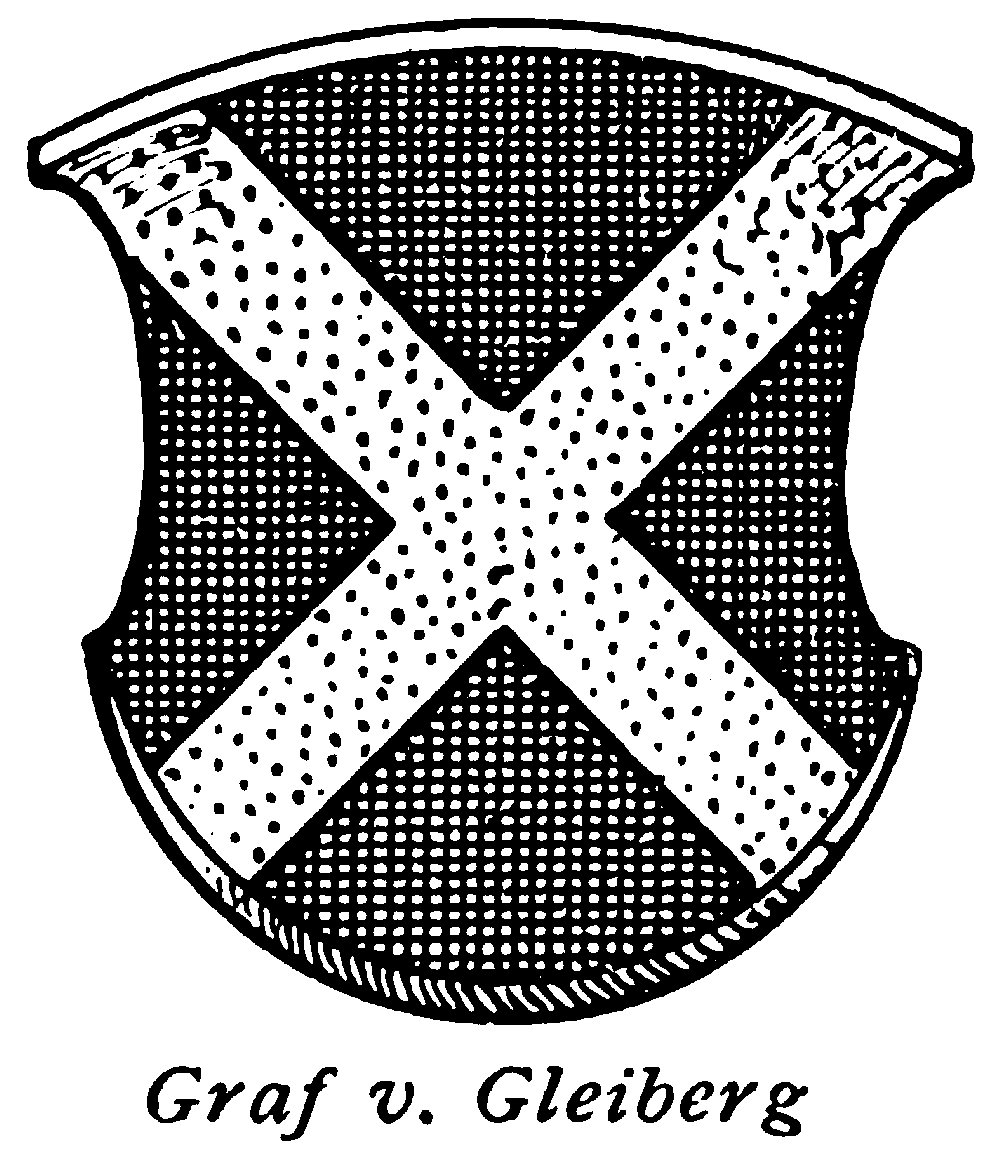 Wappen Graf von Gleiberg